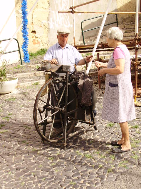 amolador de tesouras e facas